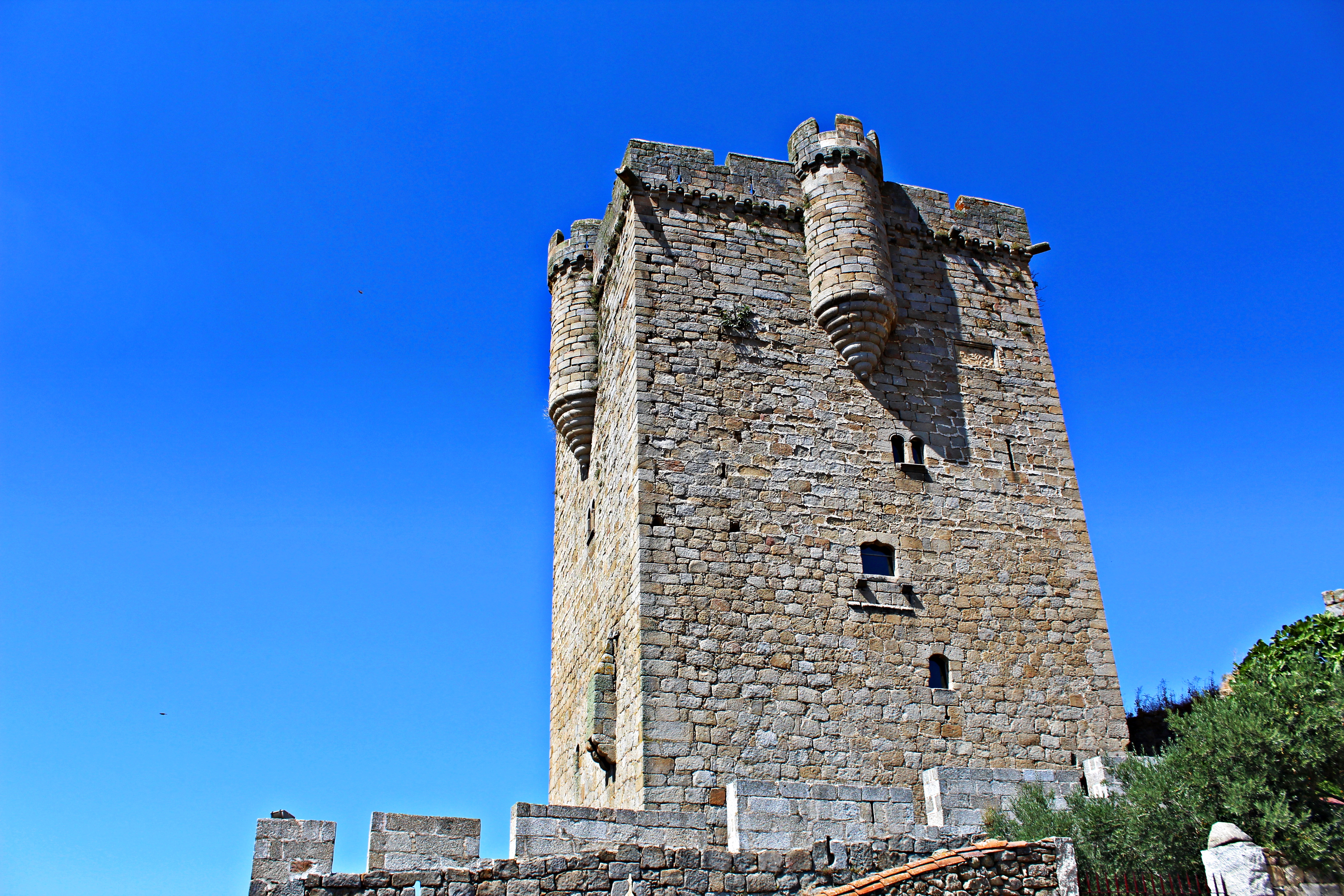 Torre del homenaje del castillo de San Felices de Gallegos en la provincia de Salamanca